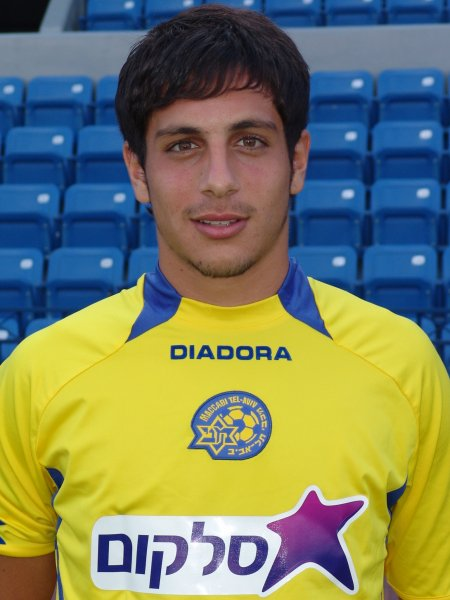 דור מלול, שחקן מכבי תל אביב (Dor Malul of Maccabi Tel Aviv)